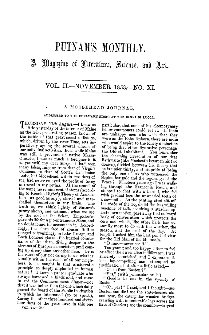 Primera página de la revista Putnam's Monthly: vol 2, November 1853, no. XI.